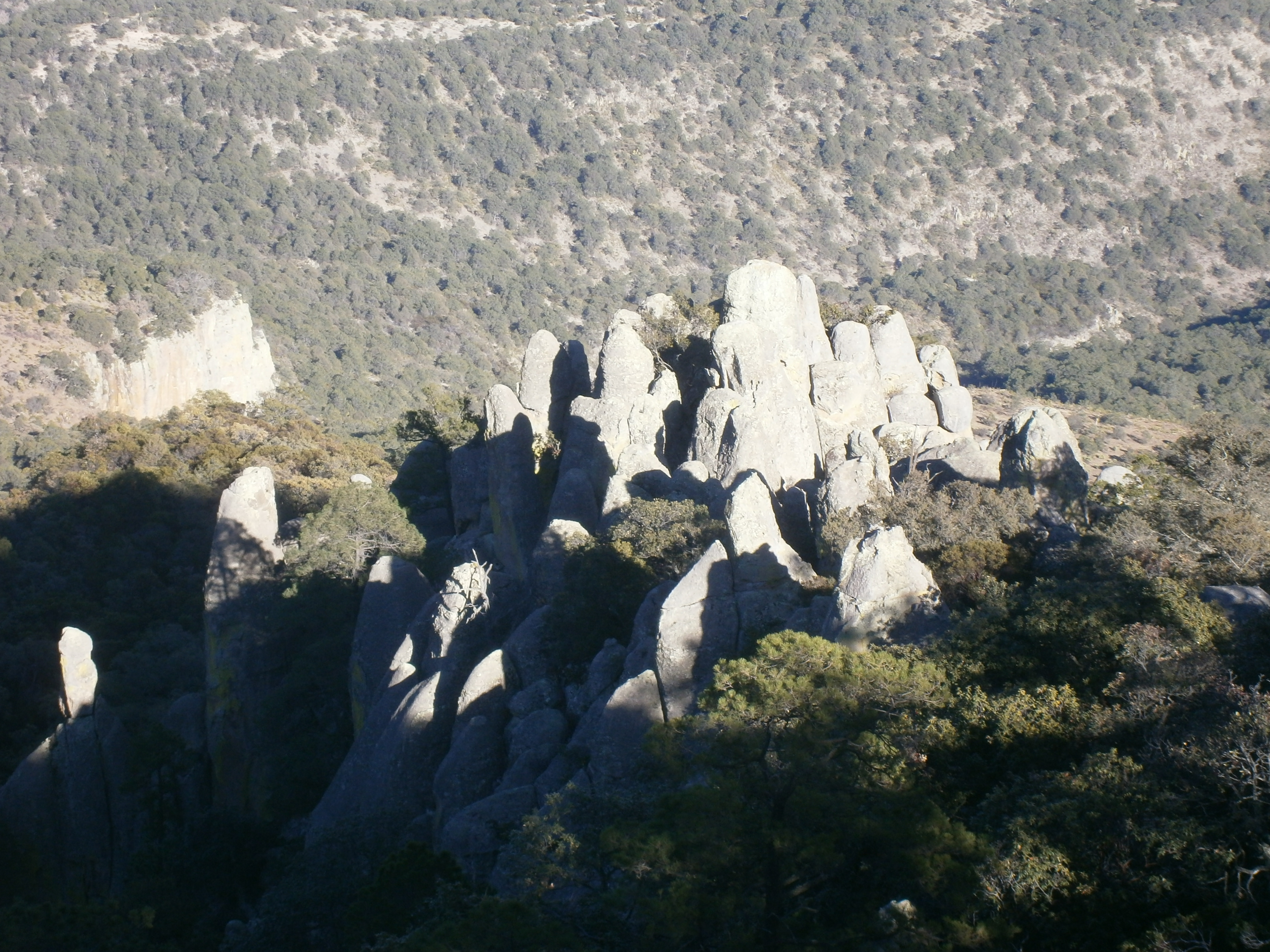 Estos organos y mas se encuentran en la sierra de Valparaiso